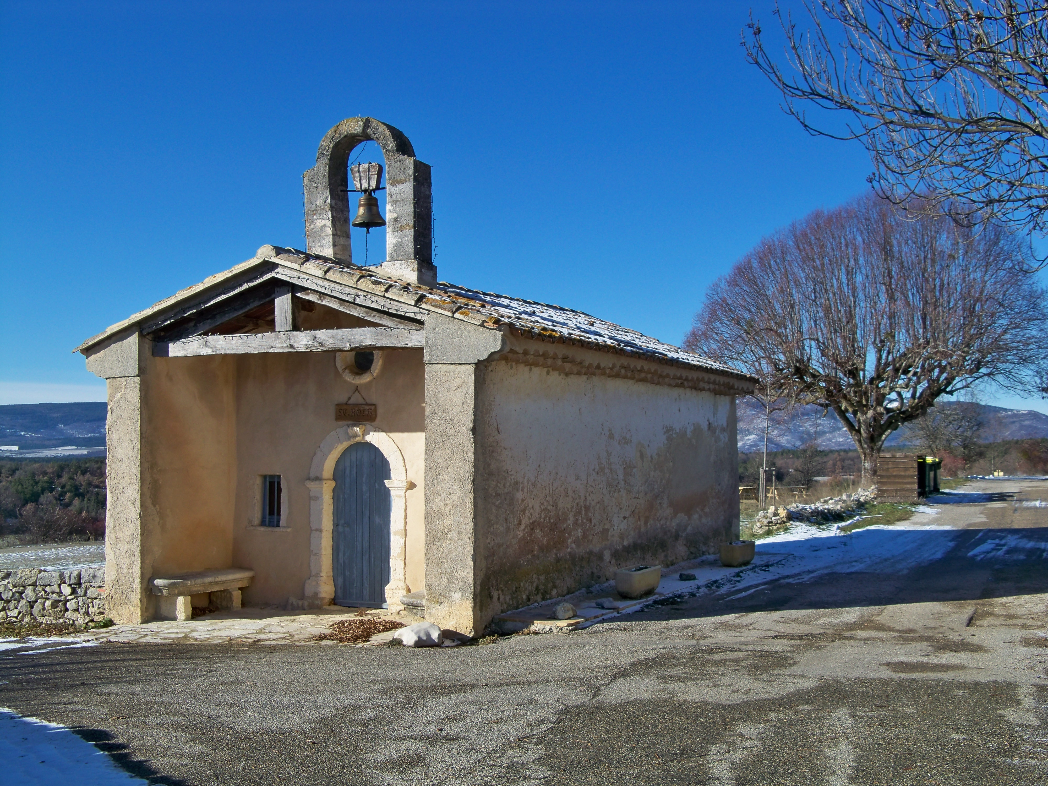 Chapelle Saint Roch à Saint Trinit, Vaucluse, France